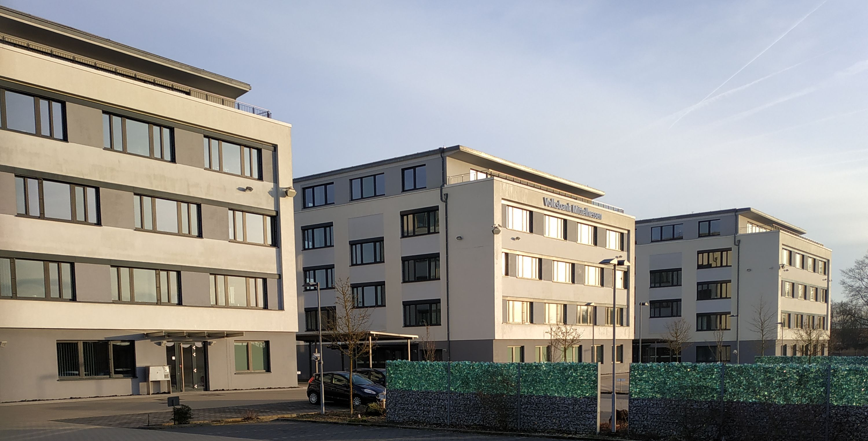 Hauptverwaltung der Volksbank Mittelhessen in Wetzlar